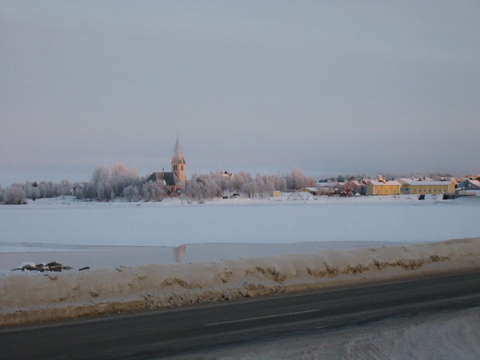 Eglise d'Arjeplog (Suède) en hiver. Photo Mathieu Front